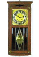 Der Federzug-Regulator, zwischen 1880 und 1930 in Deutschland die beliebteste Wohnzimmeruhr, wurde im Schwarzwald schon sehr früh industriell gefertigt. Sorgfältig gearbeitete und äußerst ganggenaue Uhren in edlen Holzgehäusen mit Glastüren an der Frontseite